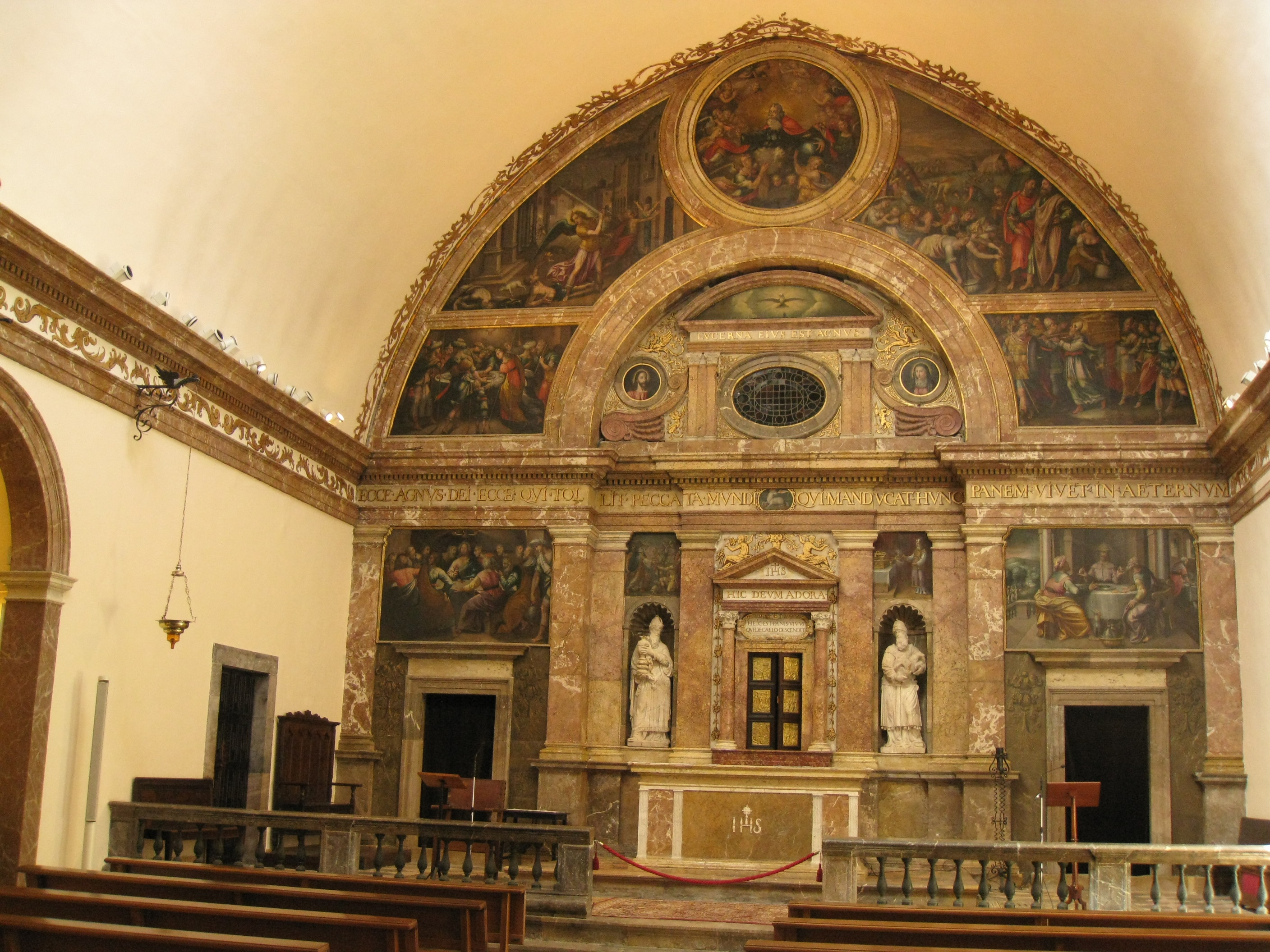 Catedral de Santa Maria (Tarragona)